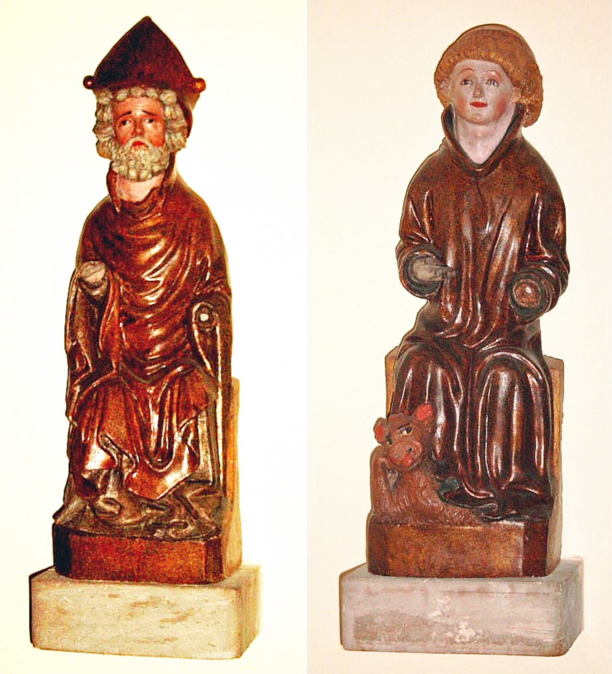 Zwei Heiligenfiguren von 1420 aus der Andreas-Kapelle in Leipzig-Knautnaundorf, jetzt im Stadtgeschichtlichen Museum Leipzig. Links Bischof (?), rechts Hl. Cyriakus